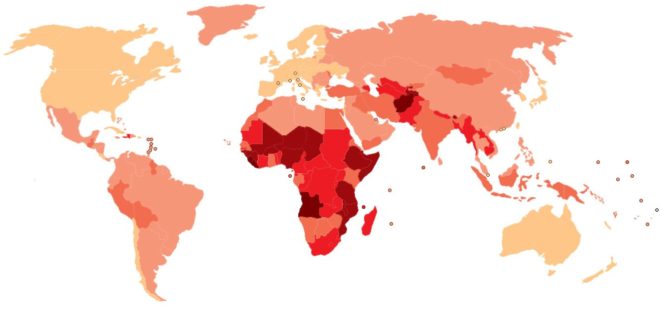 Taux de mortalité infantile sans légende